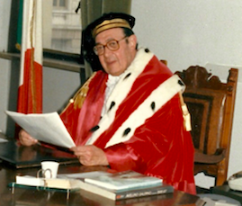 Il magistrato Pietro Carbone durante l'incarico di Primo Presidente della Corte di Appello di Salerno